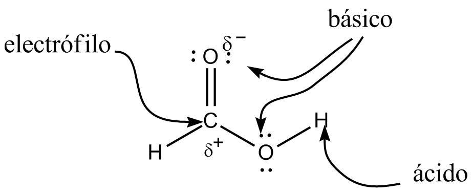 reactividad del grupo carboxilo